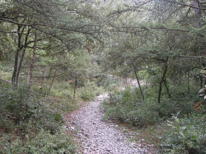 Commune de Robion/Vaucluse/draille/image personnelle/2004